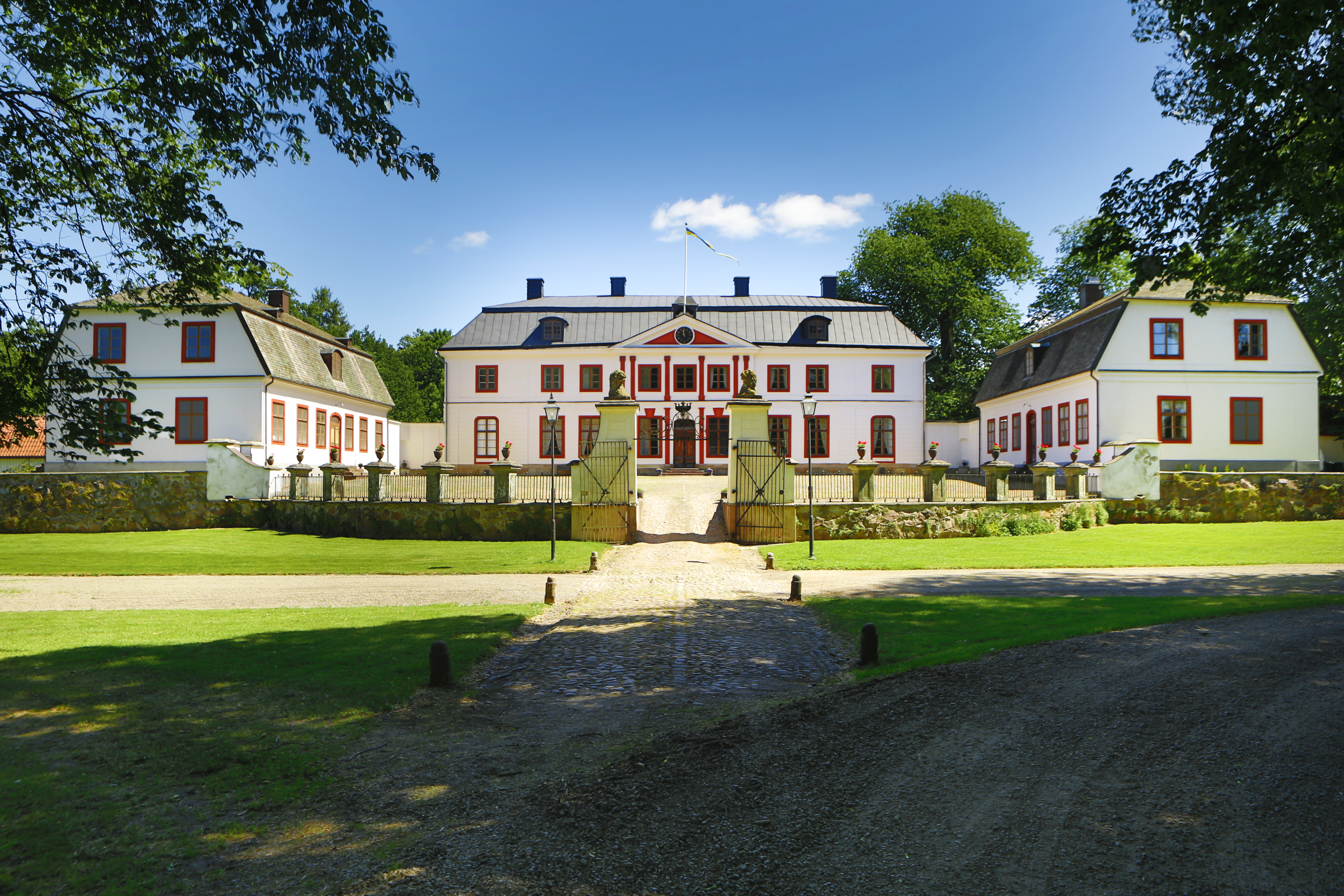 Stora Ek